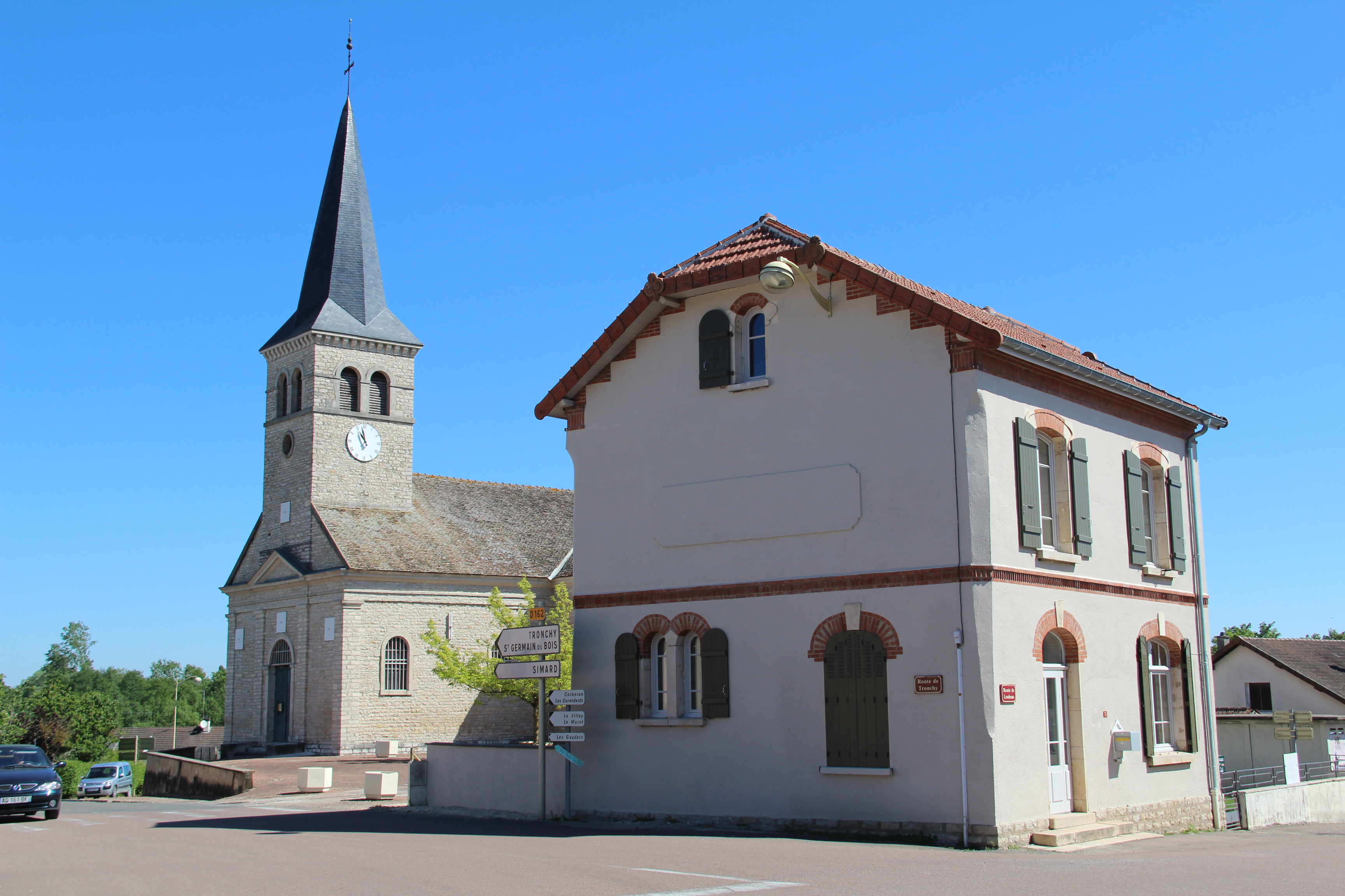 Ancienne poste et église de St Etienne en Bresse